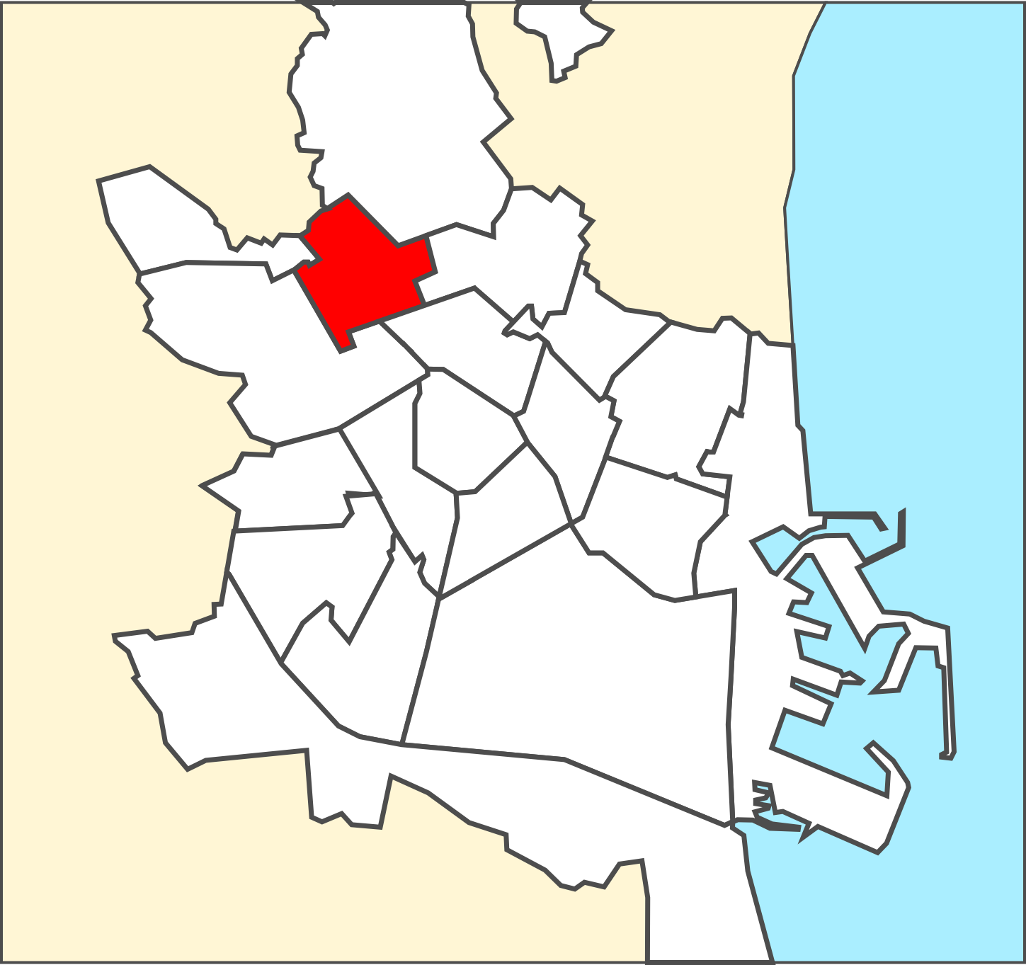 Districte de Benicalap.